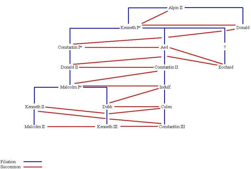 arbre généalogique des premiers roi écossais (árbol genealógico de los primeros reinos escoceses) Création personelle (et amateur ça se voit)